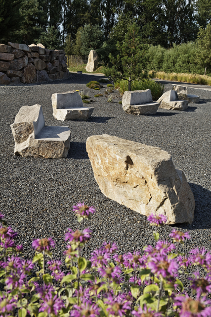 Les jardins de Colette, parc floral littéraire, le Jardin de Bretagne